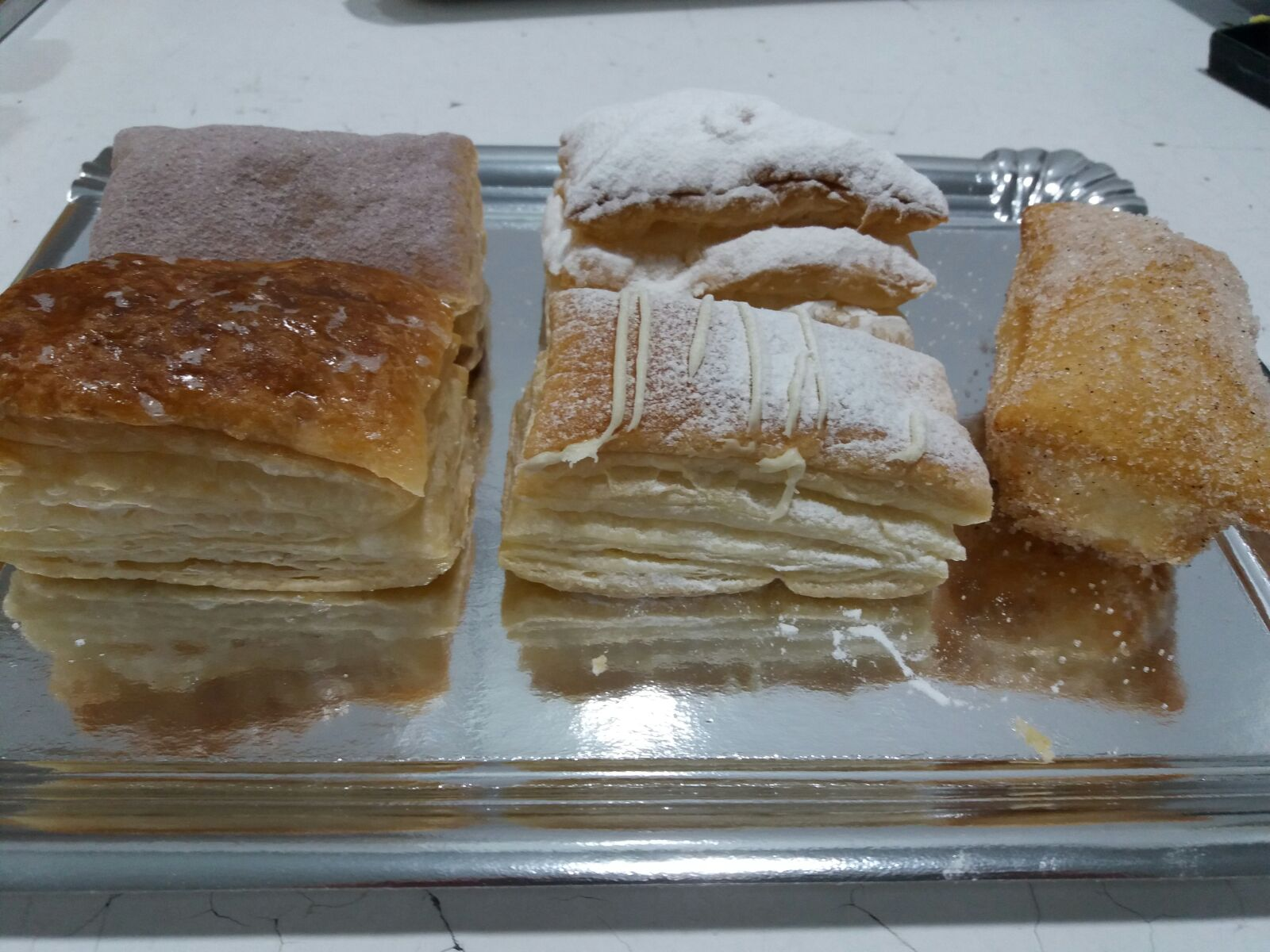 Distintas variedades de Miguelitos: chocolate, chocolate blanco, bañado, centenario y original